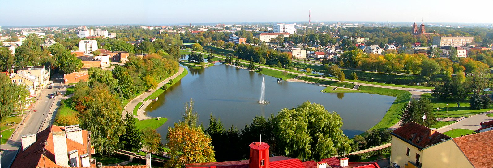 Panevėžys. Senvagės panorama. 2006 m. rugsėjis.